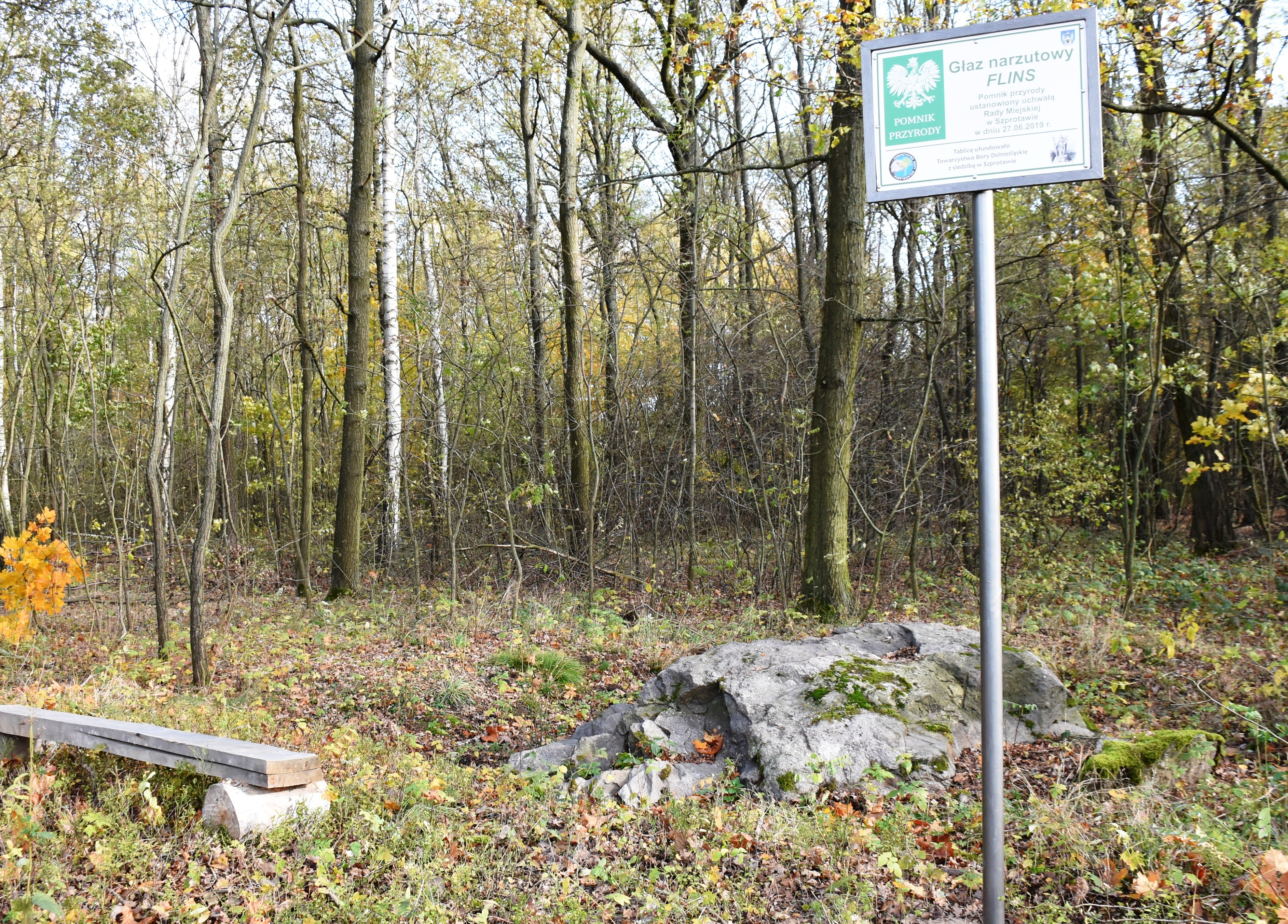 Flins to pomnik przyrody nieożywionej, ustanowiony w 2019 r. Pomnikiem przyrody był także przed wojną, uznany przez prof. Schube za jeden z najważniejszych pomników dawnej rejencji legnickiej. Jego nazwa nawiązuje do lokalnych podań o pogańskim bożku Flinsie, czczonym m.in. w okolicach Szprotawy.